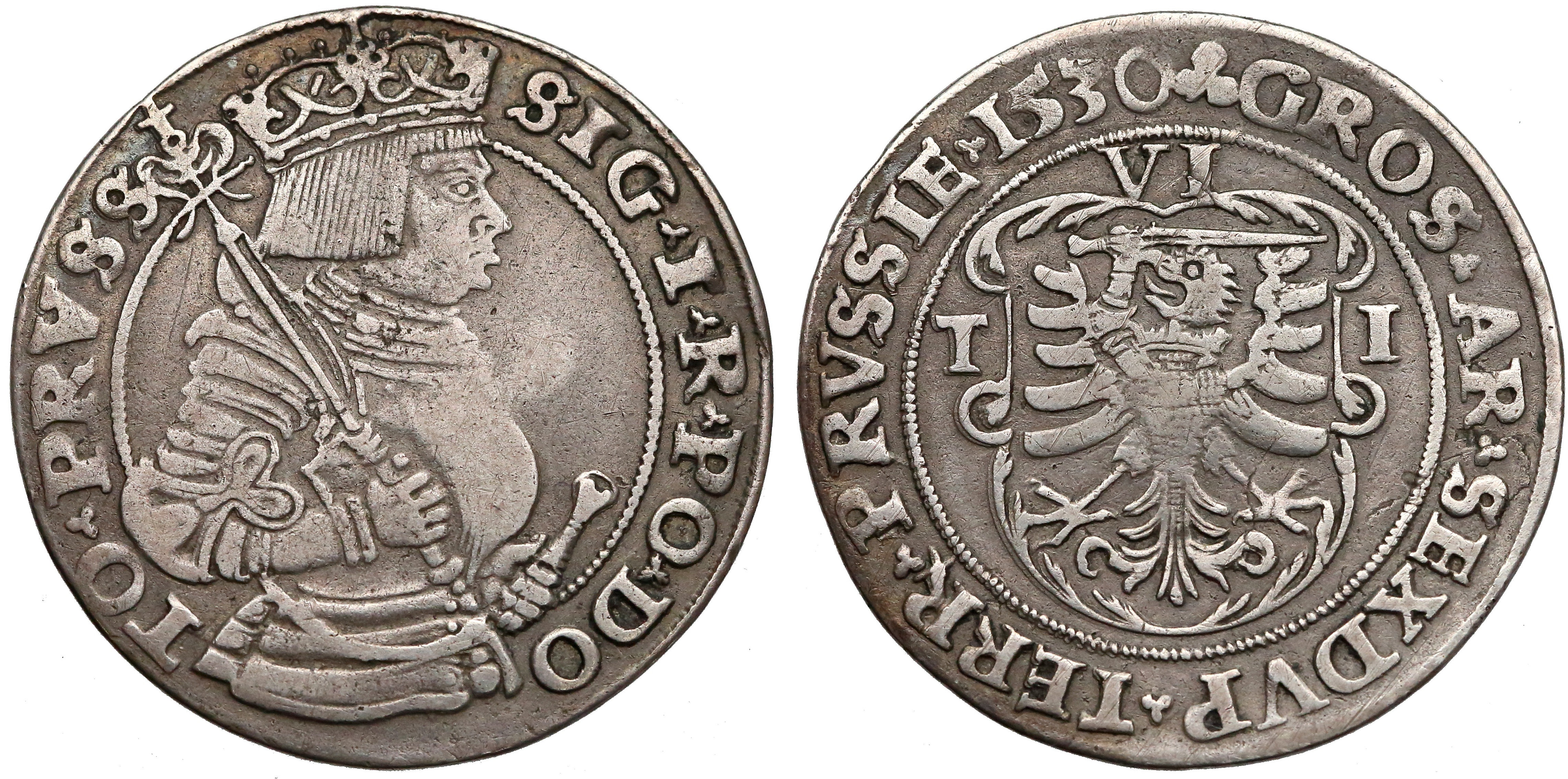 Szóstak miejski Toruń 1530